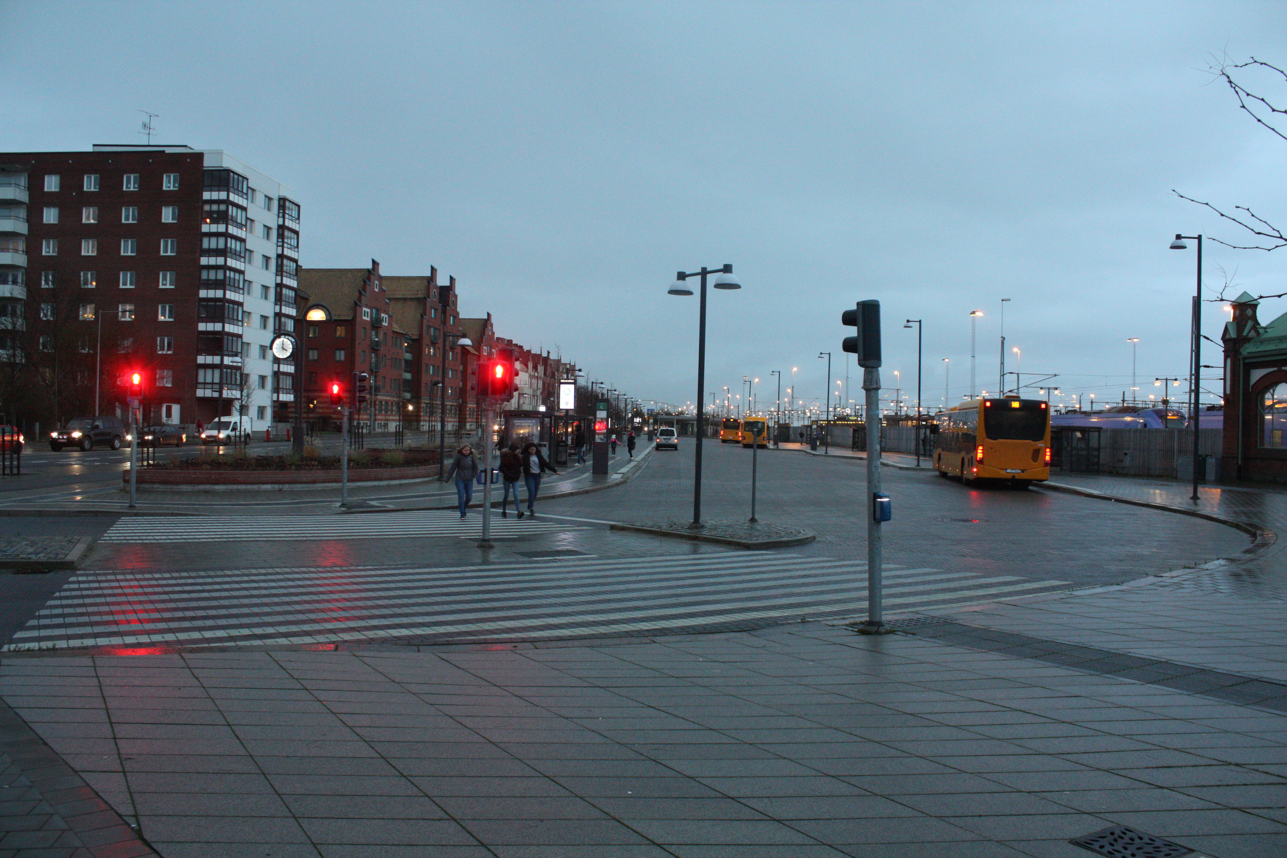 Paradas de ônibus (busshållplatser) - Trelleborg centralstation